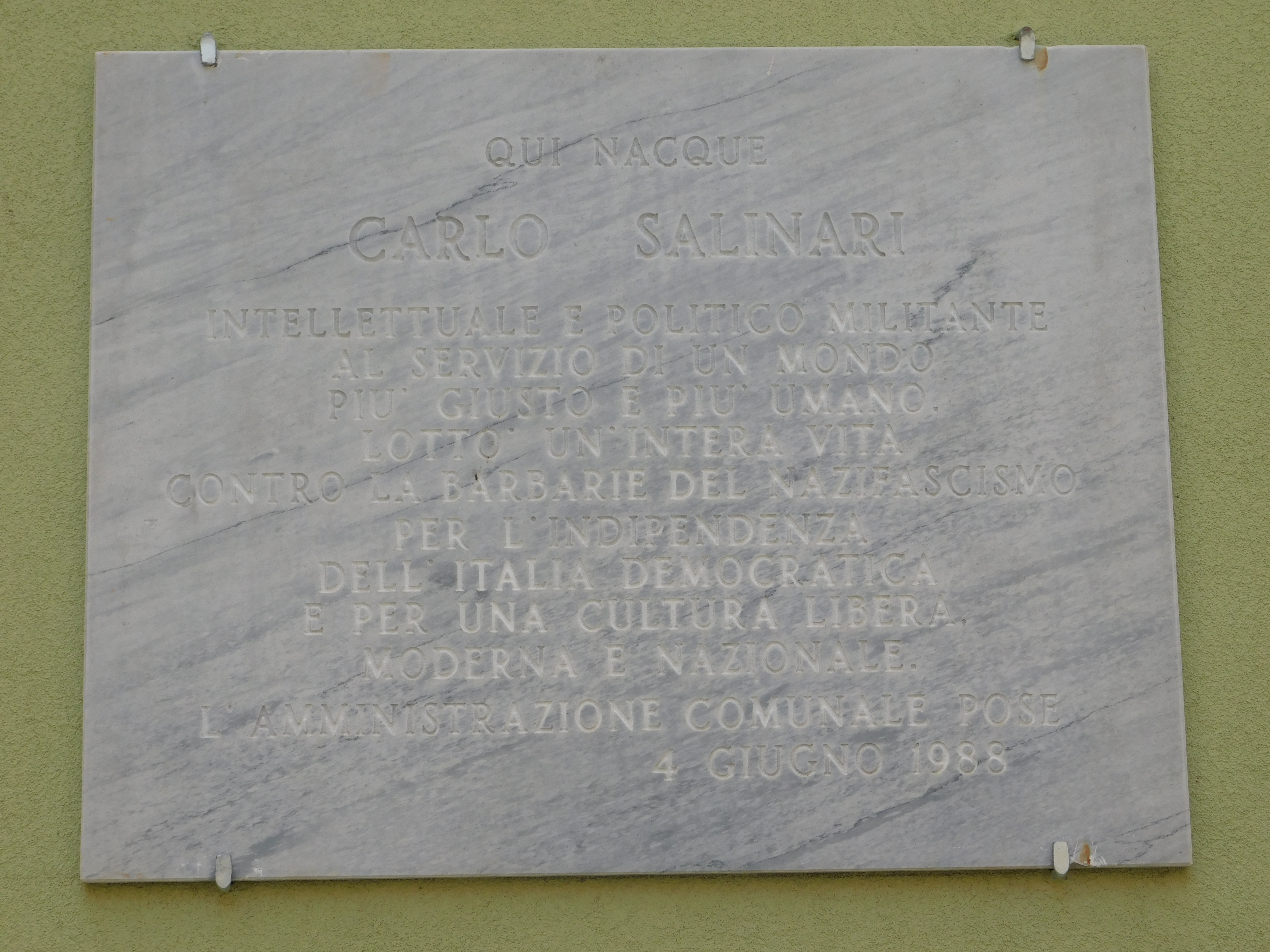 La targa commemorativa affissa sulla casa in cui visse Carlo Salinari